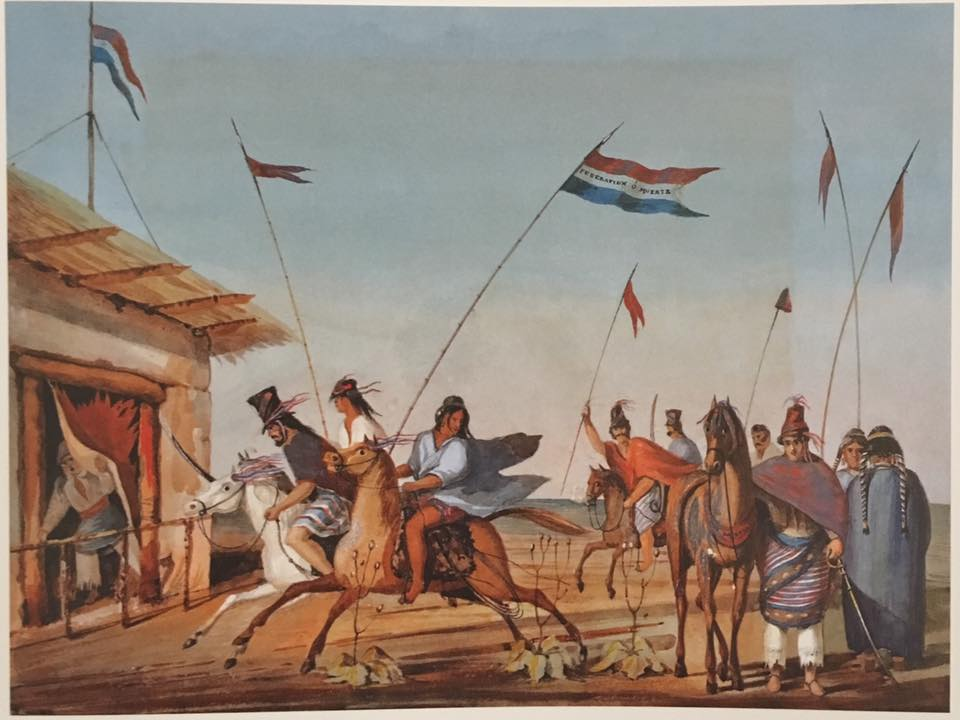 La montonera, acuarela.